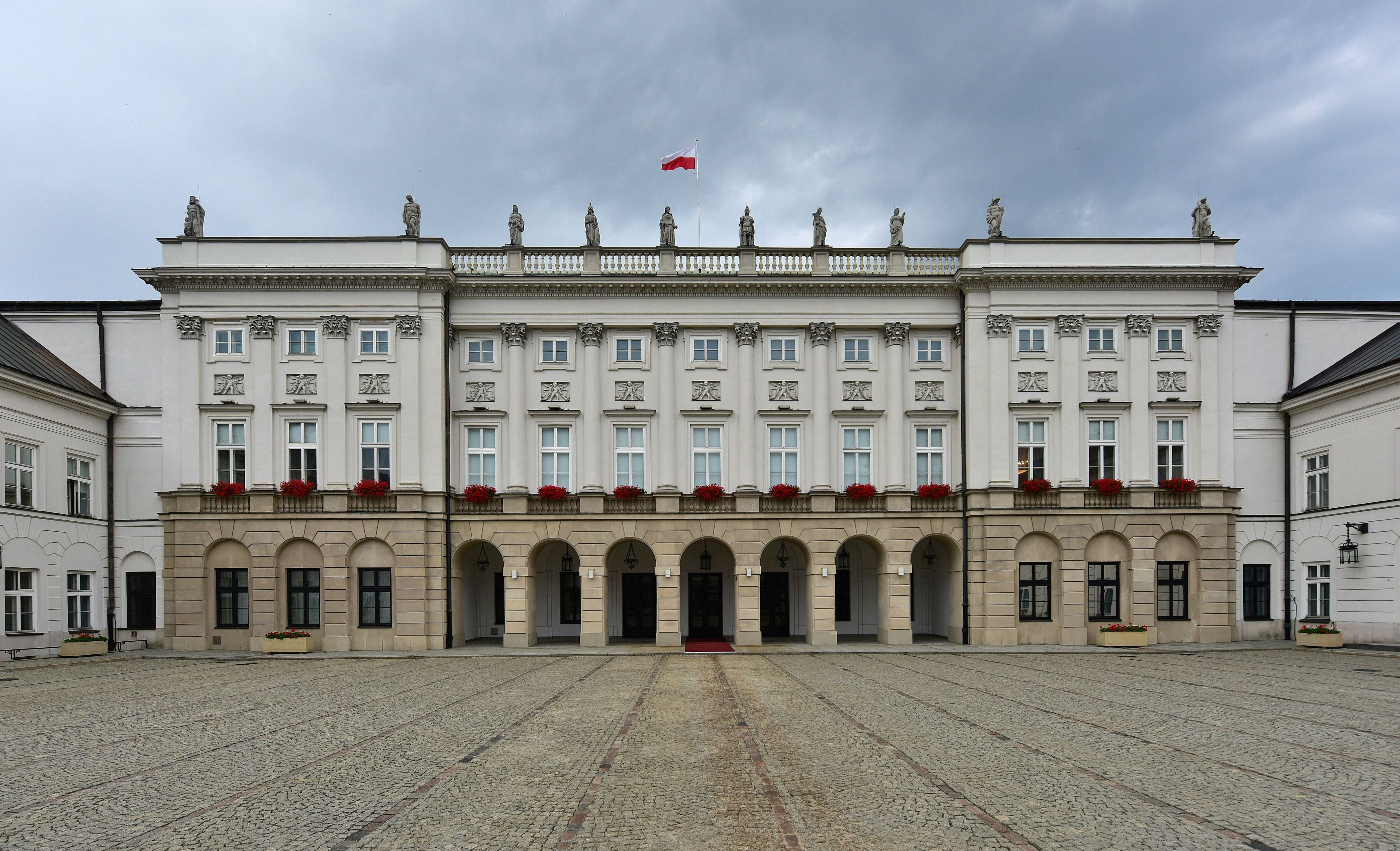 Pałac Prezydencki w Warszawie (korpus główny, fasada frontowa)